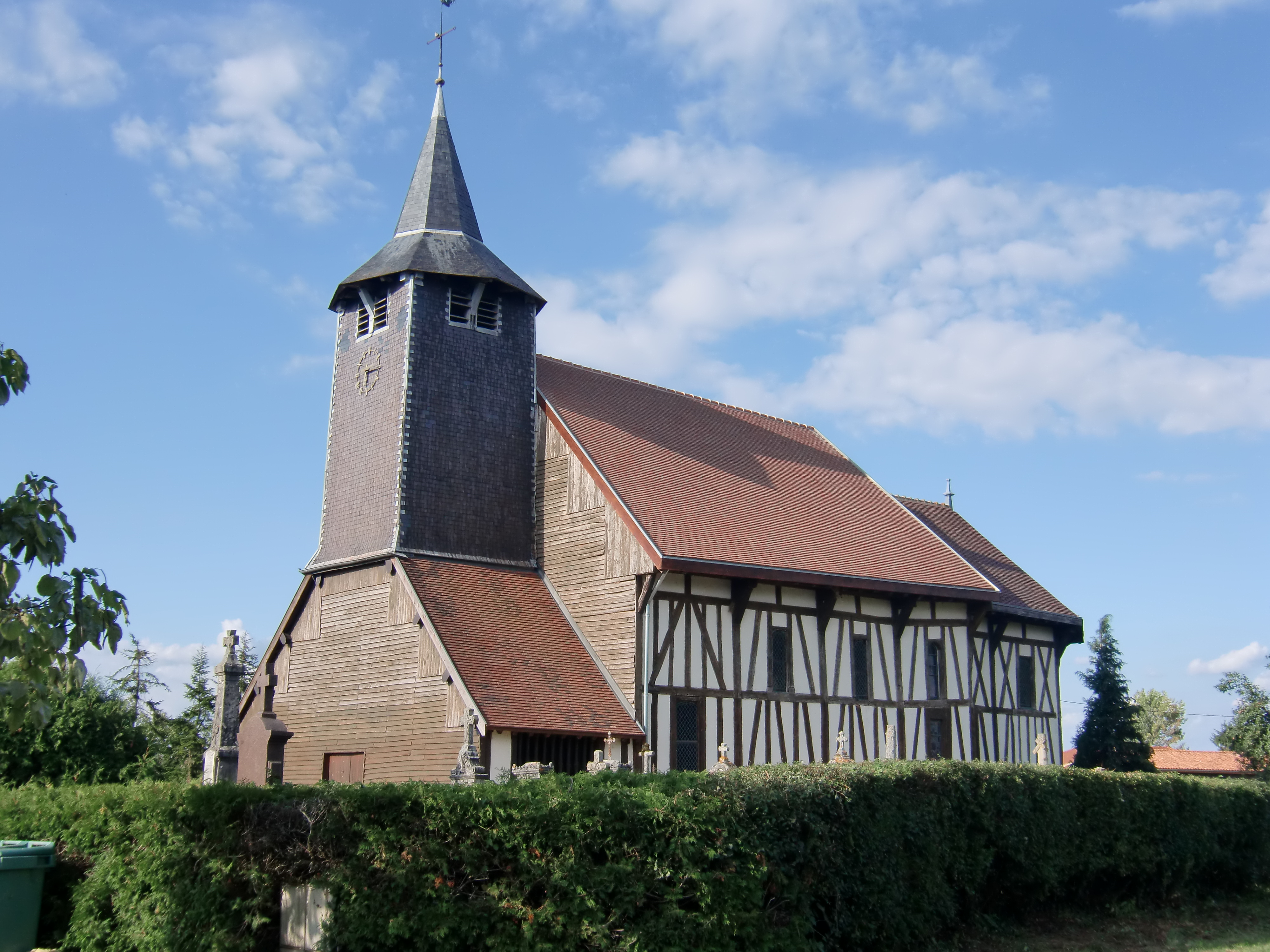 Eglise de la Nativité de la Vierge à Châtillon-sur-Broué (Marne - Champagne - France) édifice à pans de bois du pays du Der